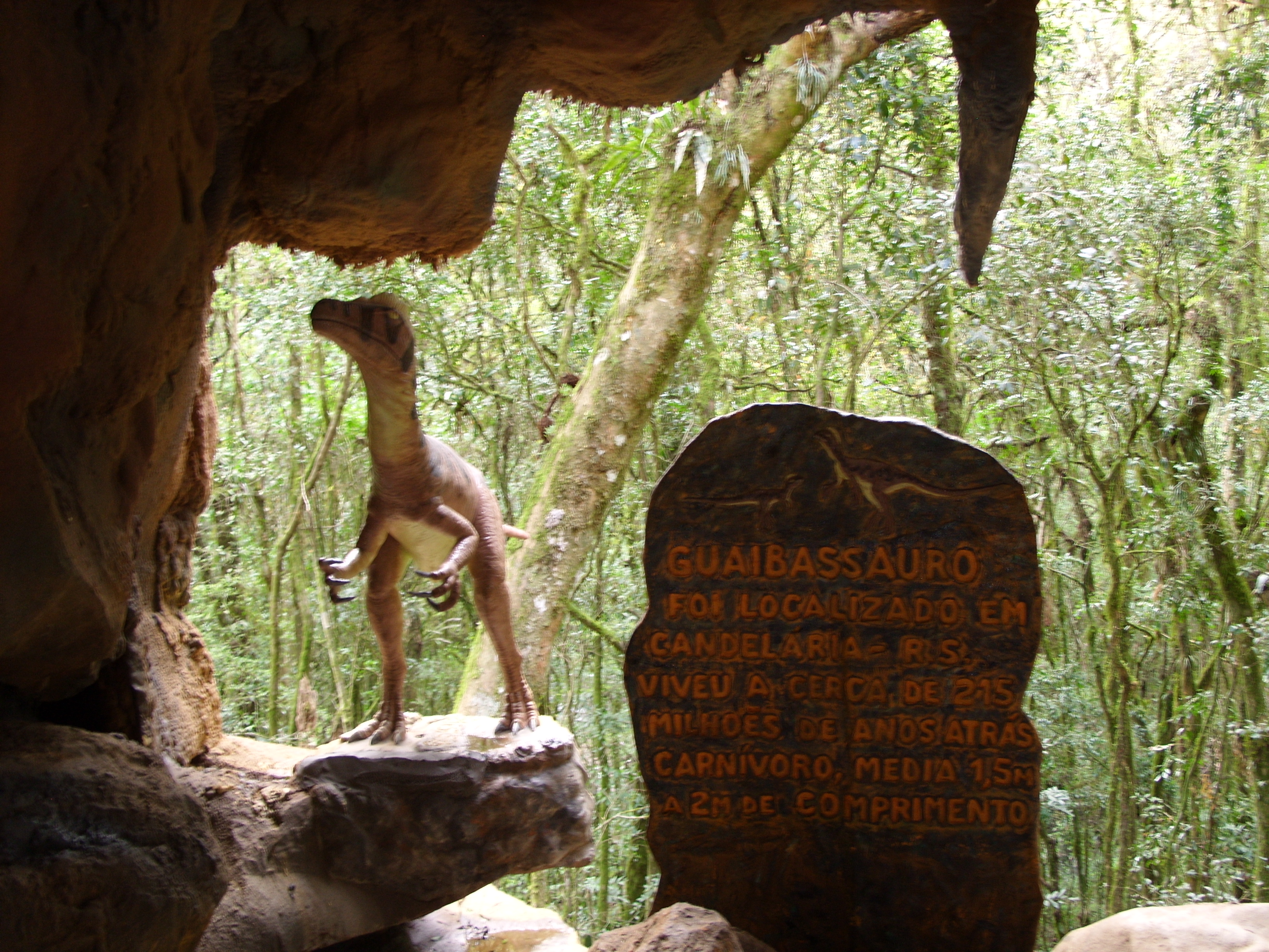 Guaibassauro no parque Floribal em Canela, Rio Grande do Sul, Brasil.